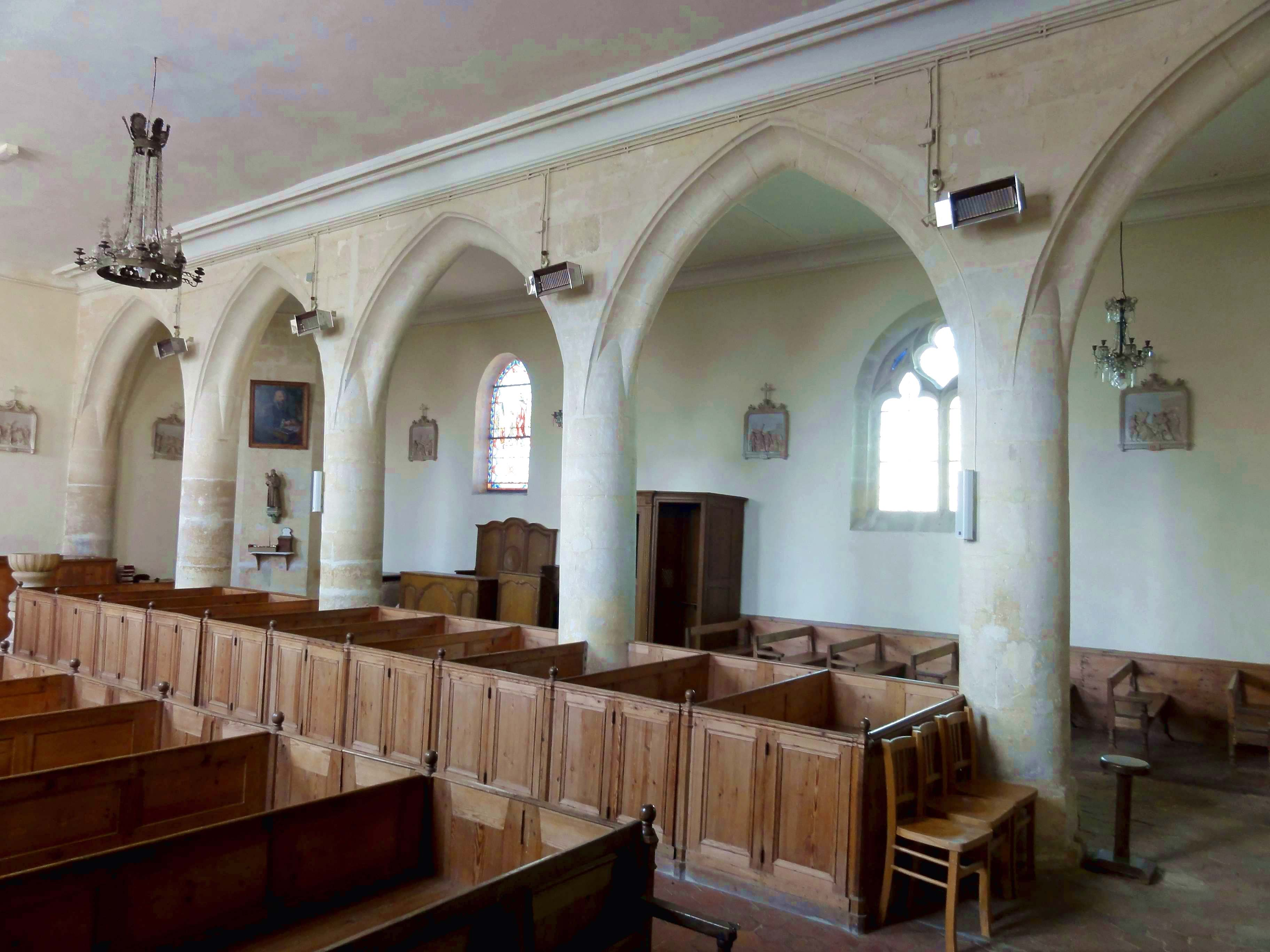 Intérieur de l'église - voir titre.